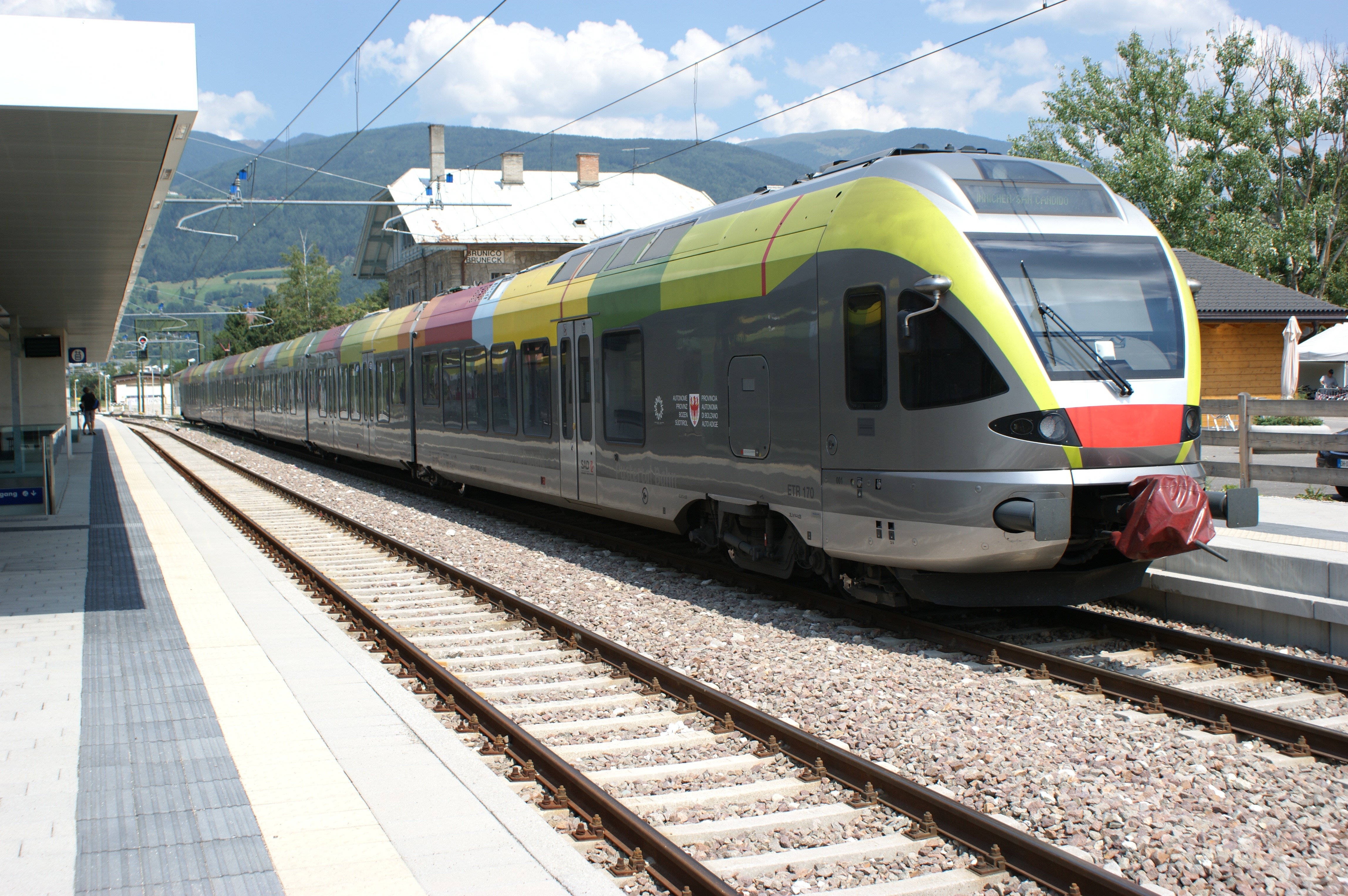 Station Bruneck mit SAD ETR 170-001 vom Typ Stadler FLIRT